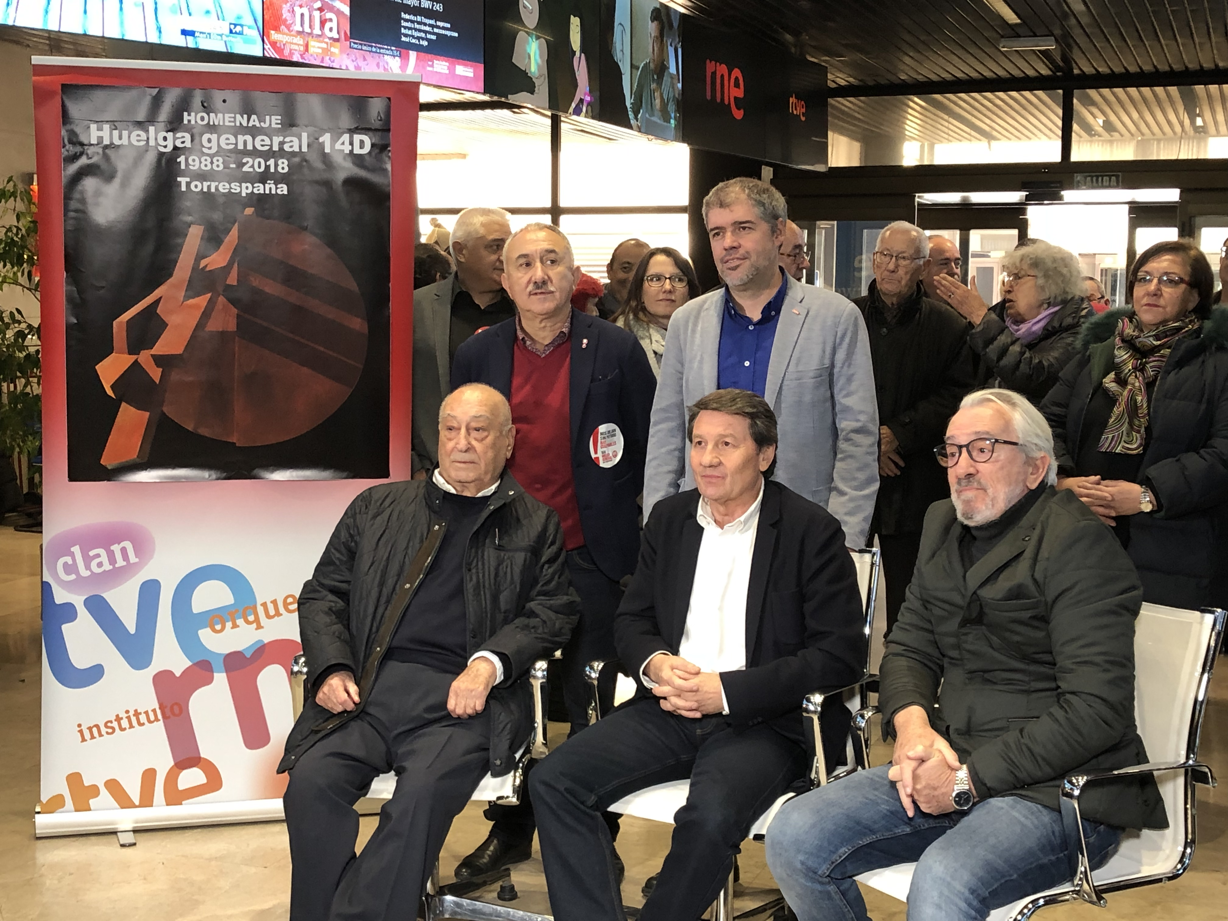 Torrespaña TVE